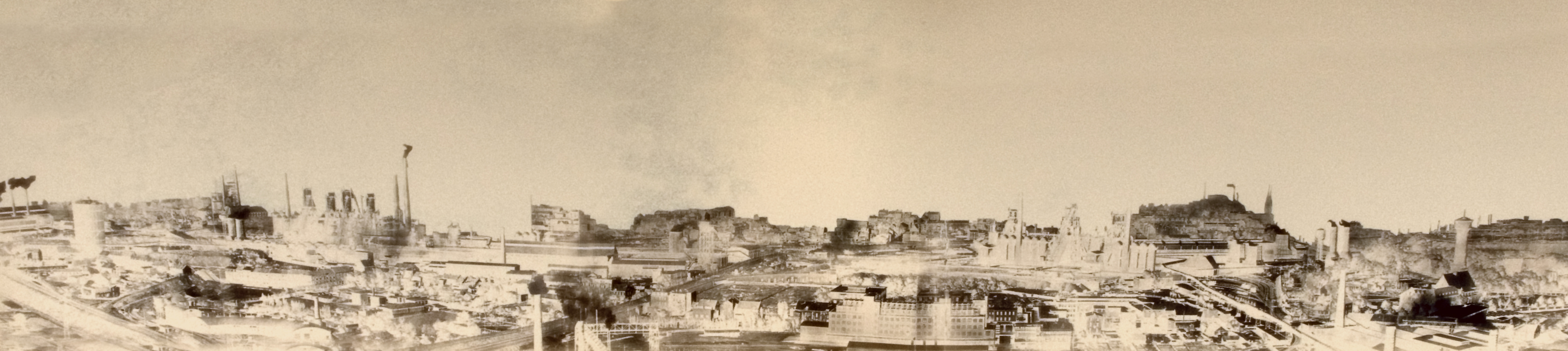 Северный Рейн - Вестфалия - панорама Оберхаузена в начале XX века